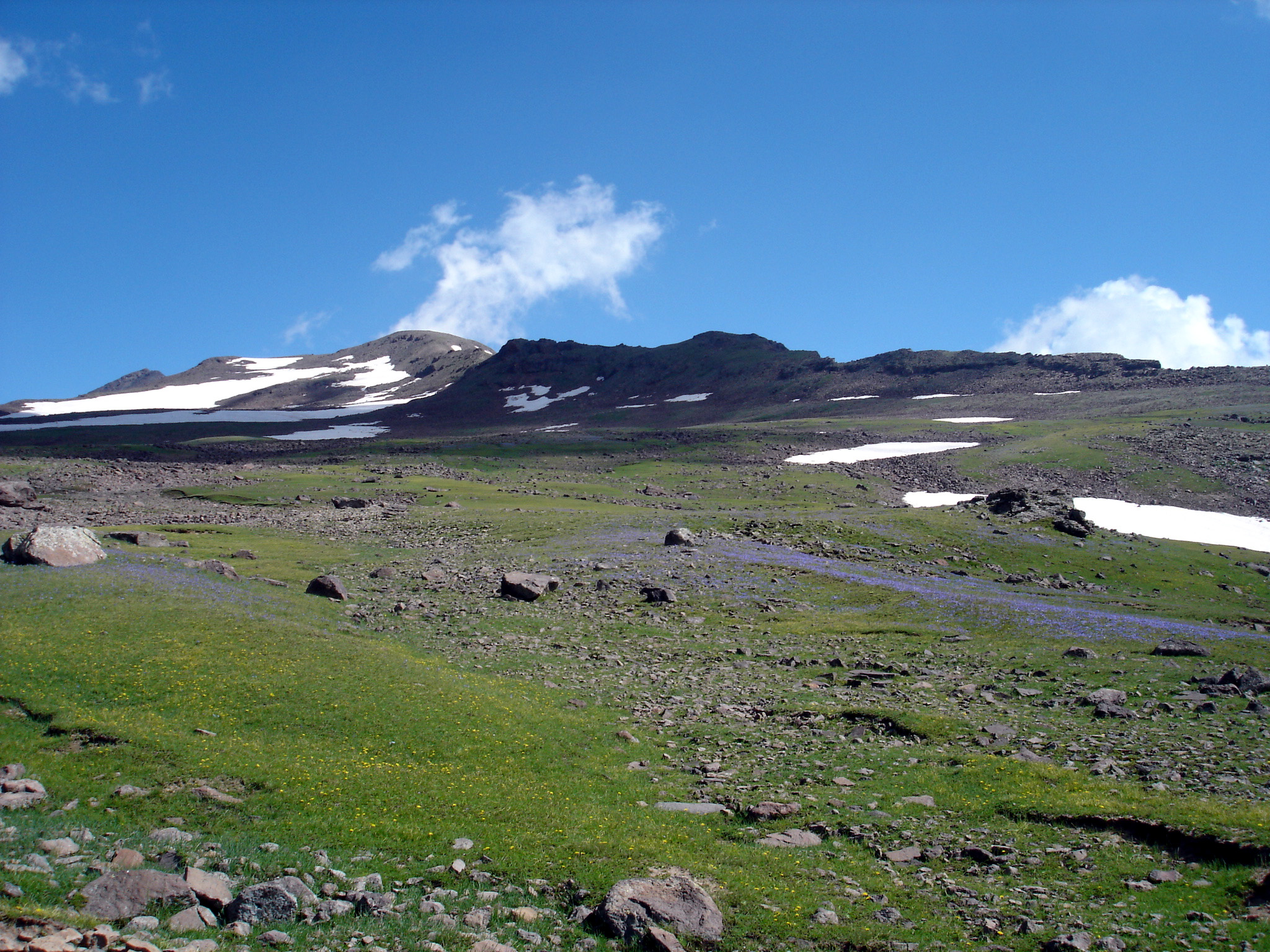 Le mont Aragats